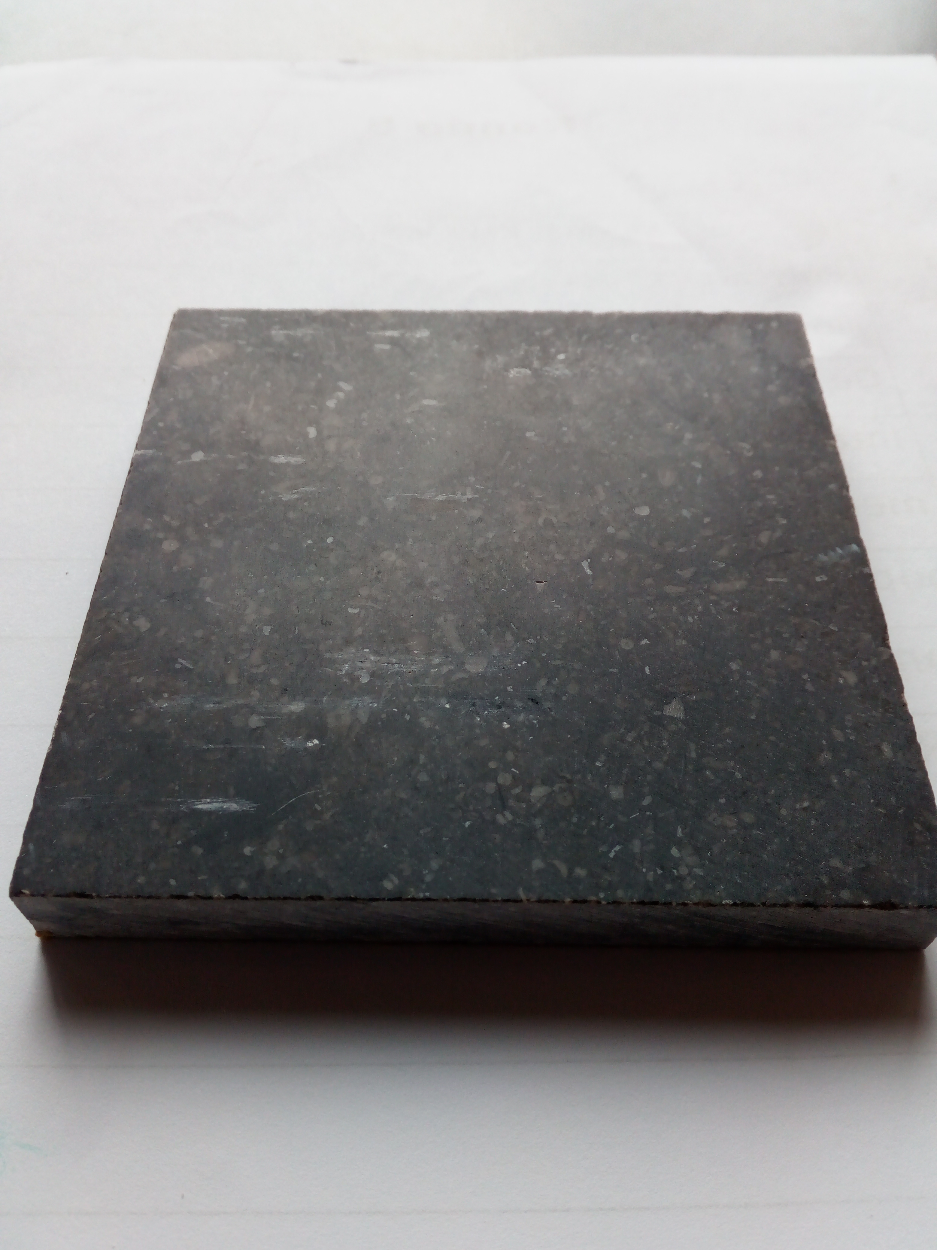 gezoete / verzoete blauwsteen